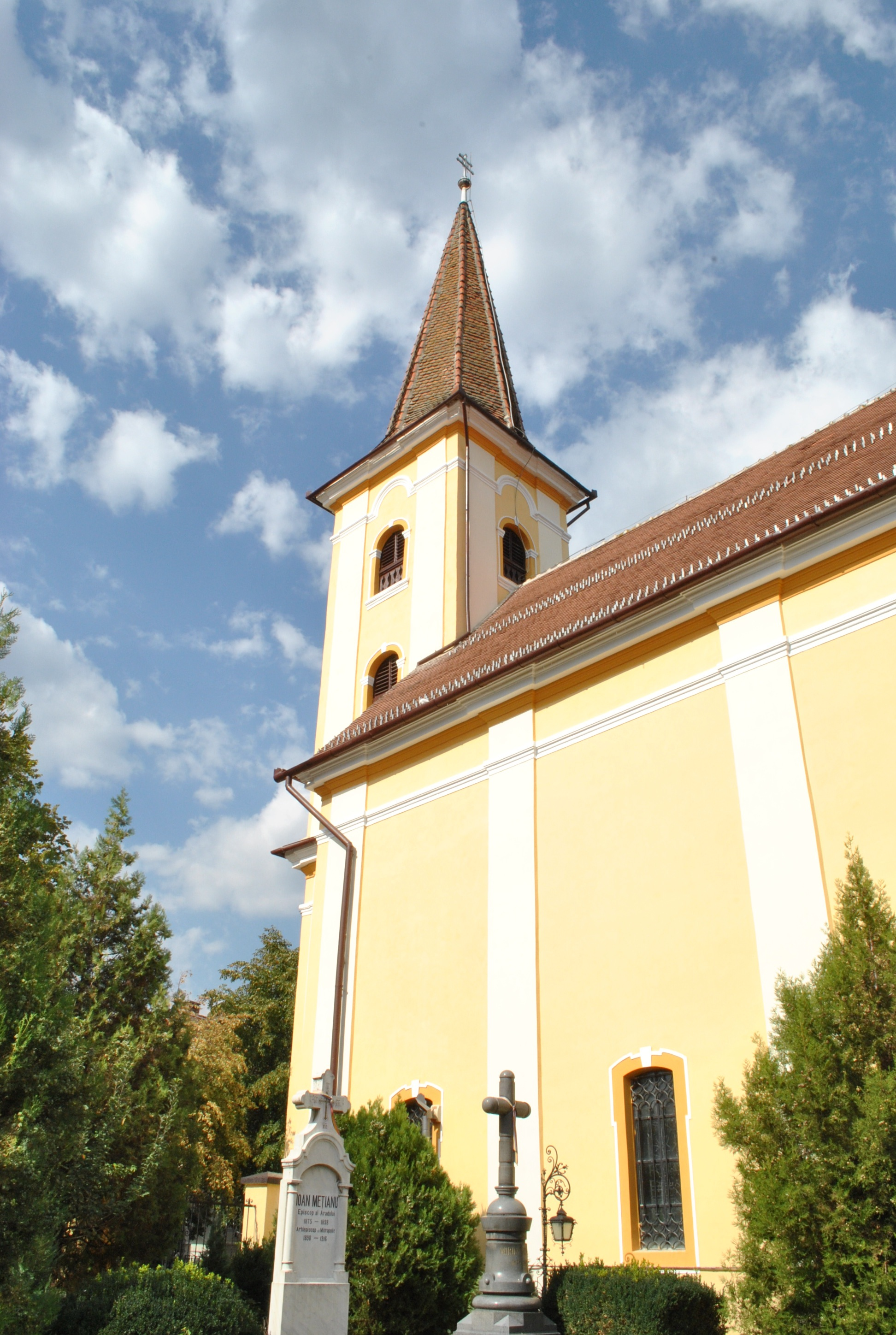 Biserica "Buna Vestire" 1778 - 1789, după 1802 01